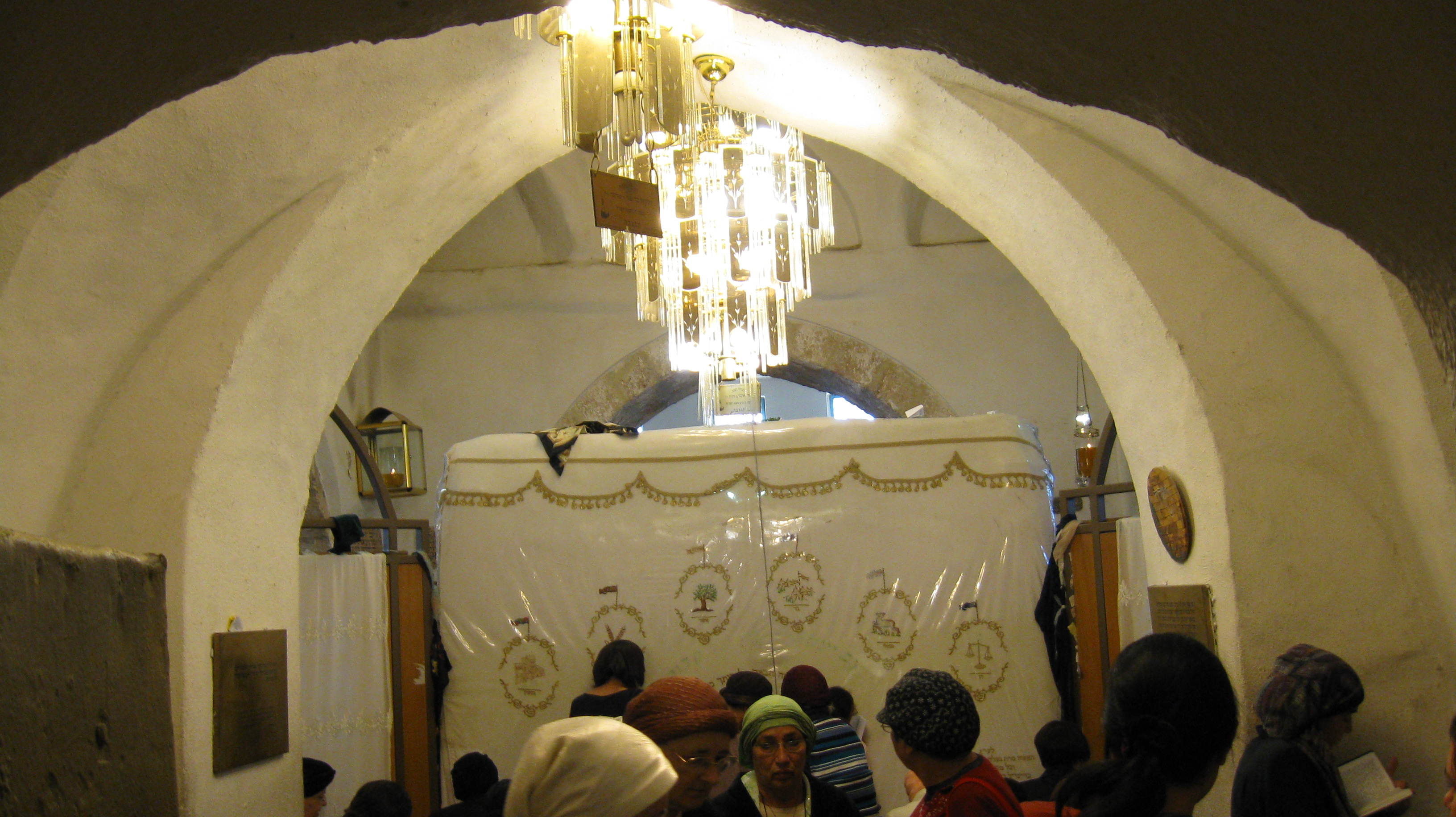 עם הפרוכת